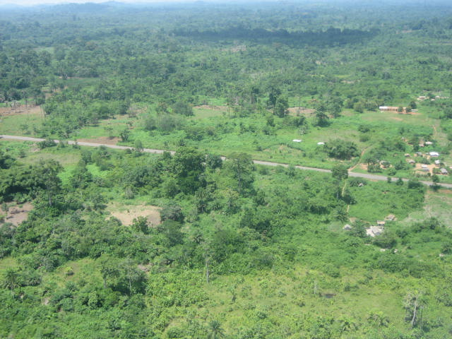 savane arborée vue de haut (Côte d'Ivoire)